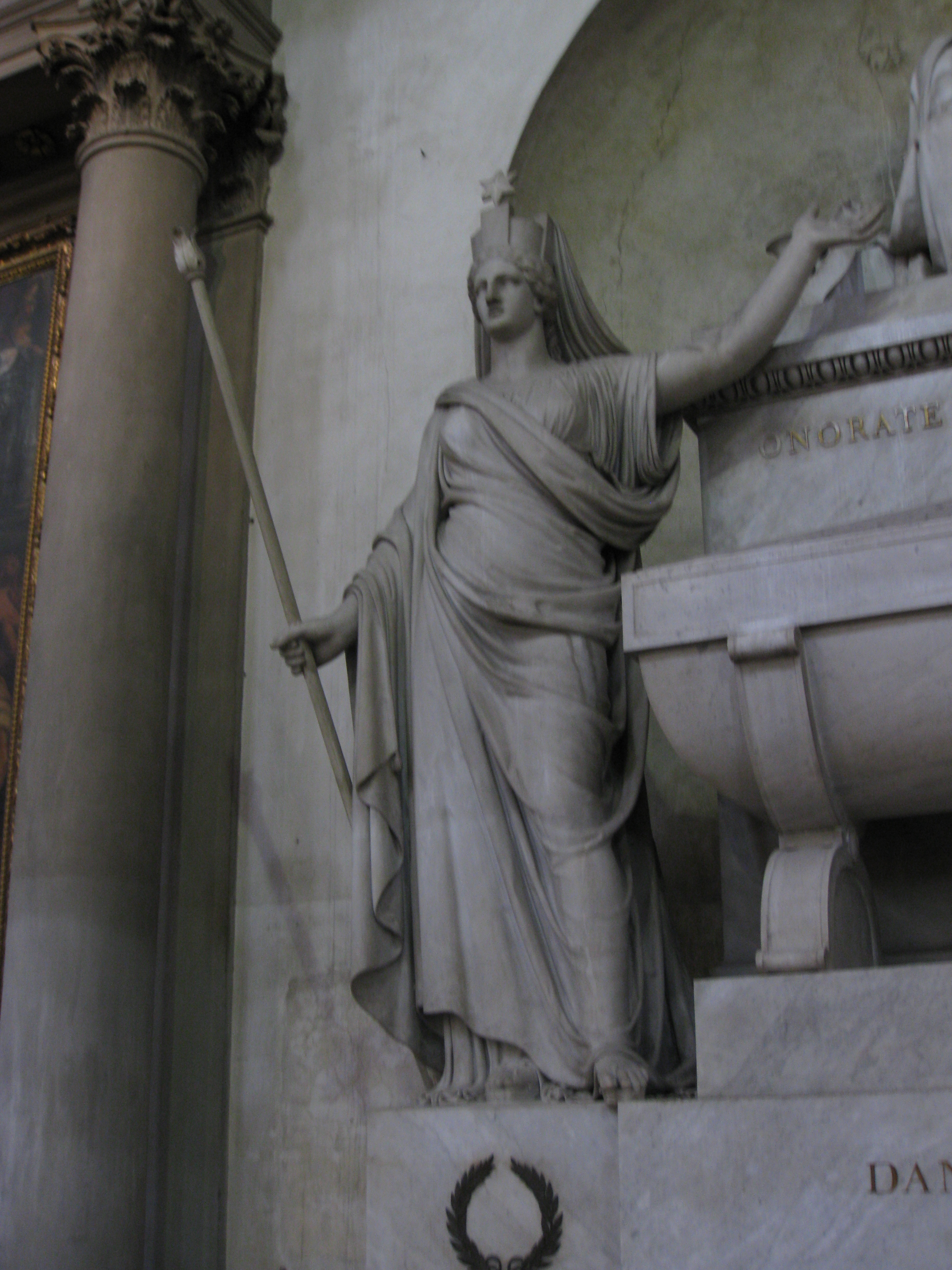 Santa Croce (Florence) כנסיית סנטה קרוצ'ה